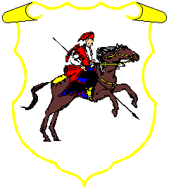 Герб Черкасc (1791)